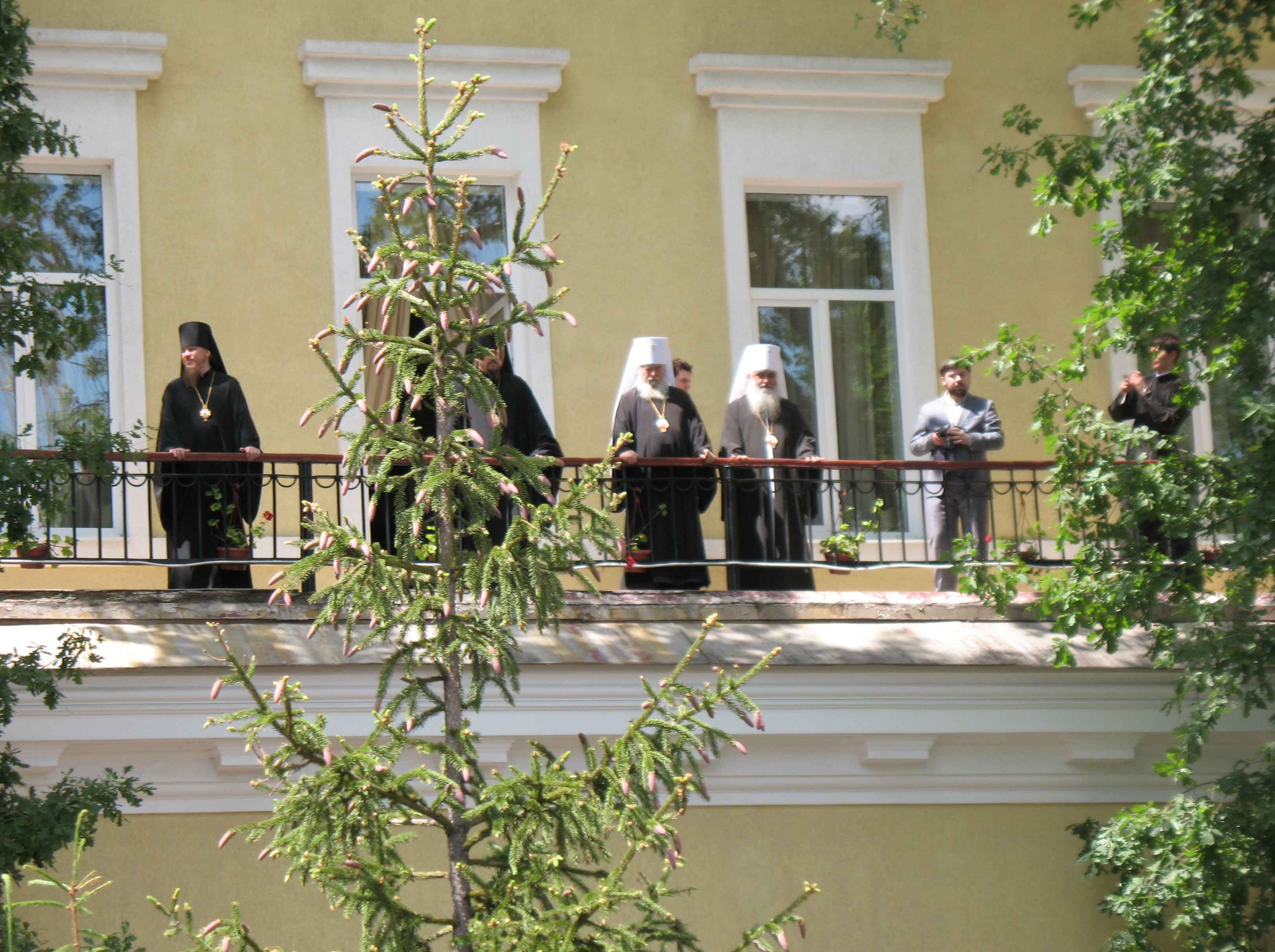 Предстоятель Украинской православной церкви митрополит Владимир Сабодан (ли?) в центре, справа от него экзарх Белоруссии митрополит Минский Филарет Вахромеев(?) на балконе Архиерейского дома Покровского монастыря встречает крестный ход 27 мая 2012 года в честь 20-летия Харьковского собора.